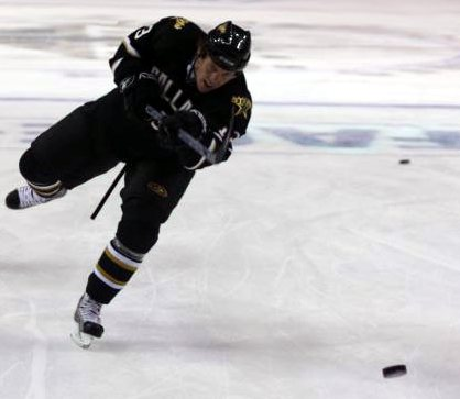 Krystofer Barch, Dallas Stars